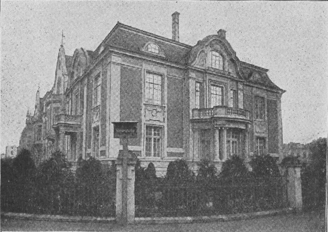 Haus Amsinck für den Reedereidirektor der Hamburg Süd Theodor Amsinck, Abteistrasse 25, 1905–1906; 1940 (Umbau); 1992 (Umbau); Emil Janda; H. R. Puttfarcken; A. Bomholt; M. Ockerverweist mit Barockformen und dunkelrotem Verblender auf sog Heimatstil, ausgeführt in konventioneller Mischbauweise mit Zementstuck, kein Backsteinrohbau, Baukosten 72 000 Mark This is a photograph of an architectural monument.